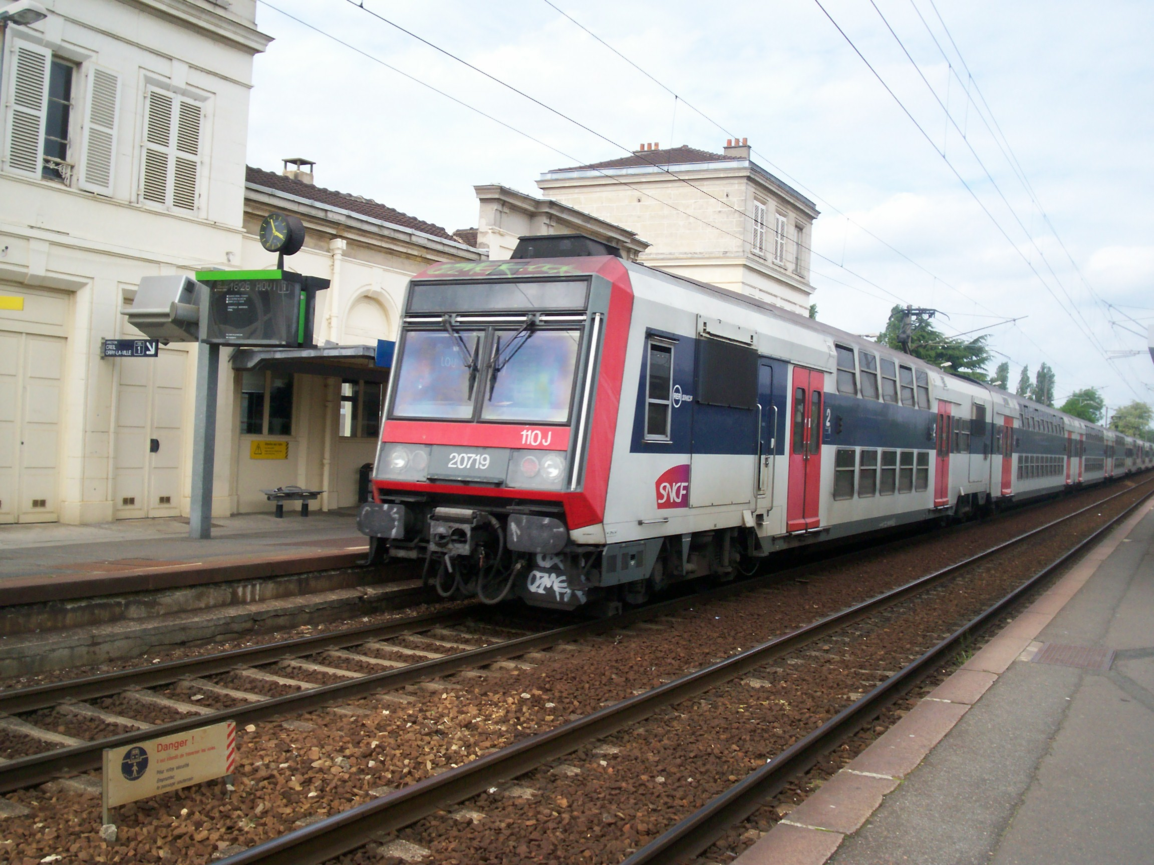 Gare de Louvres